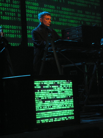 Karl Bartos in Wiesbaden 2005